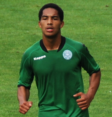 Fodboldspilleren Jeff Mensah fra Viborg FF. Her i 1. divisionskampen mod FC Roskilde på Viborg Stadion.